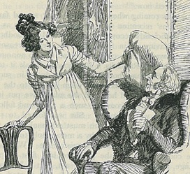 Portrait : détail dune illustration du chapitre 17 du volume III : Emma et son père